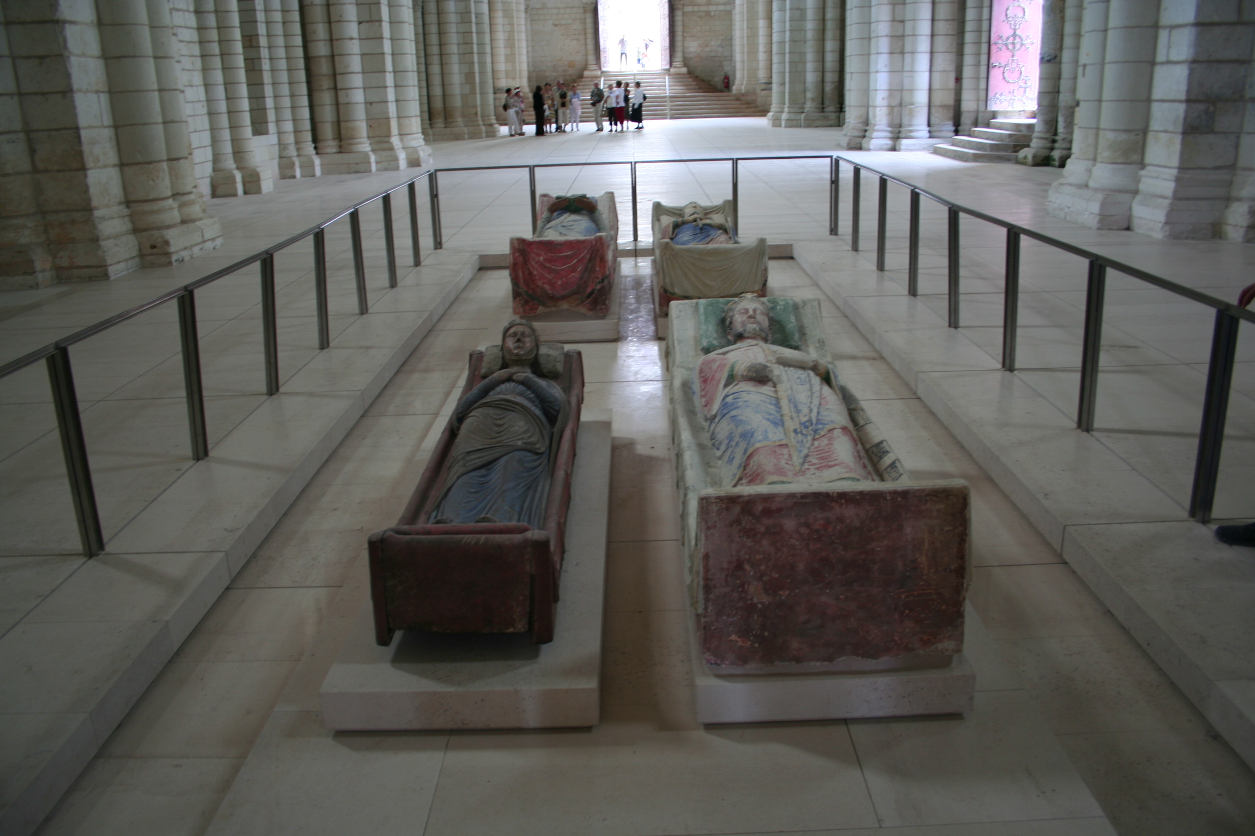 Abbaye de Fontevraud. Les gisants : Au premier plan : Richard Cœur-de-lion et sa belle-soeur Isabelle d'Angoulême (épouse de Jean-sans-terre) Au second plan : Aliénor d'Aquitaine et son époux Henri II Plantagenêt Duc d'Anjou et Roi d'Angleterre